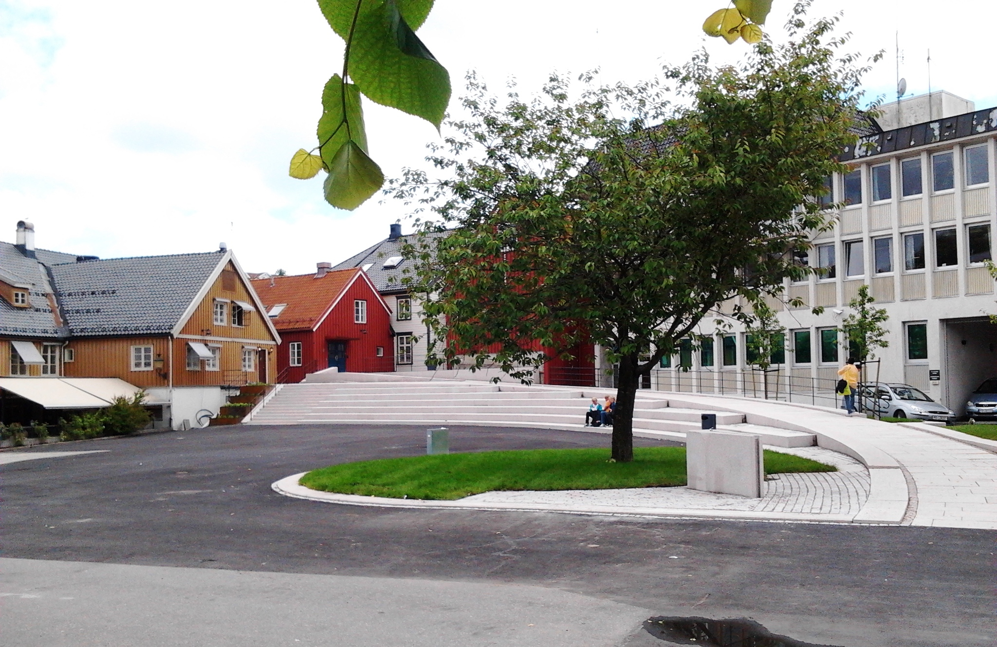 Kanalplassen i Arendal 2012